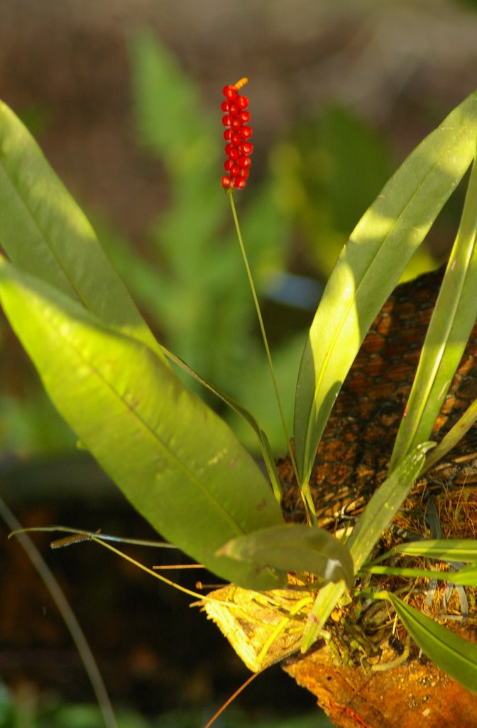 Anthurium gracile (Araceae)